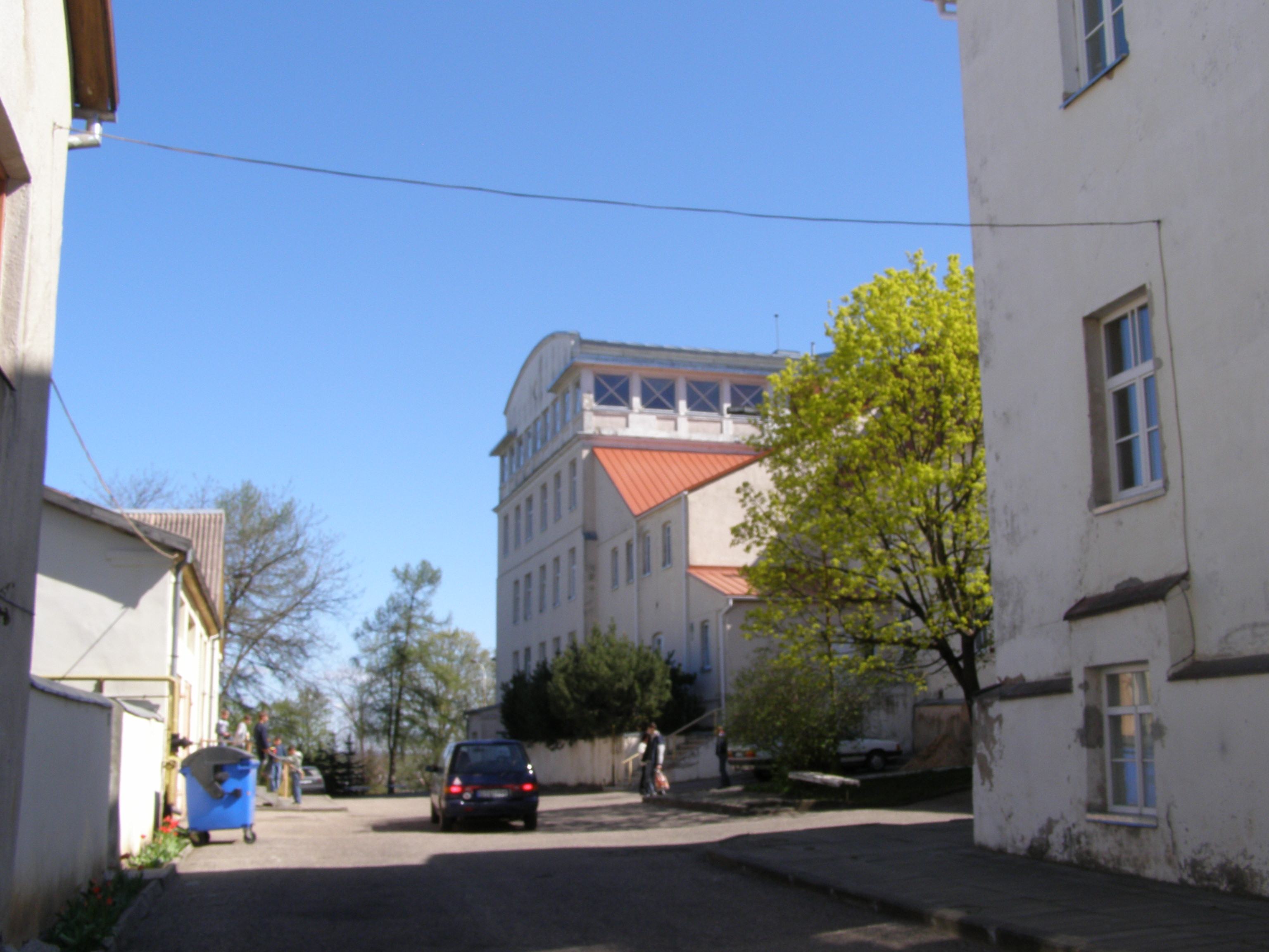 Telšių kunigų seminarija